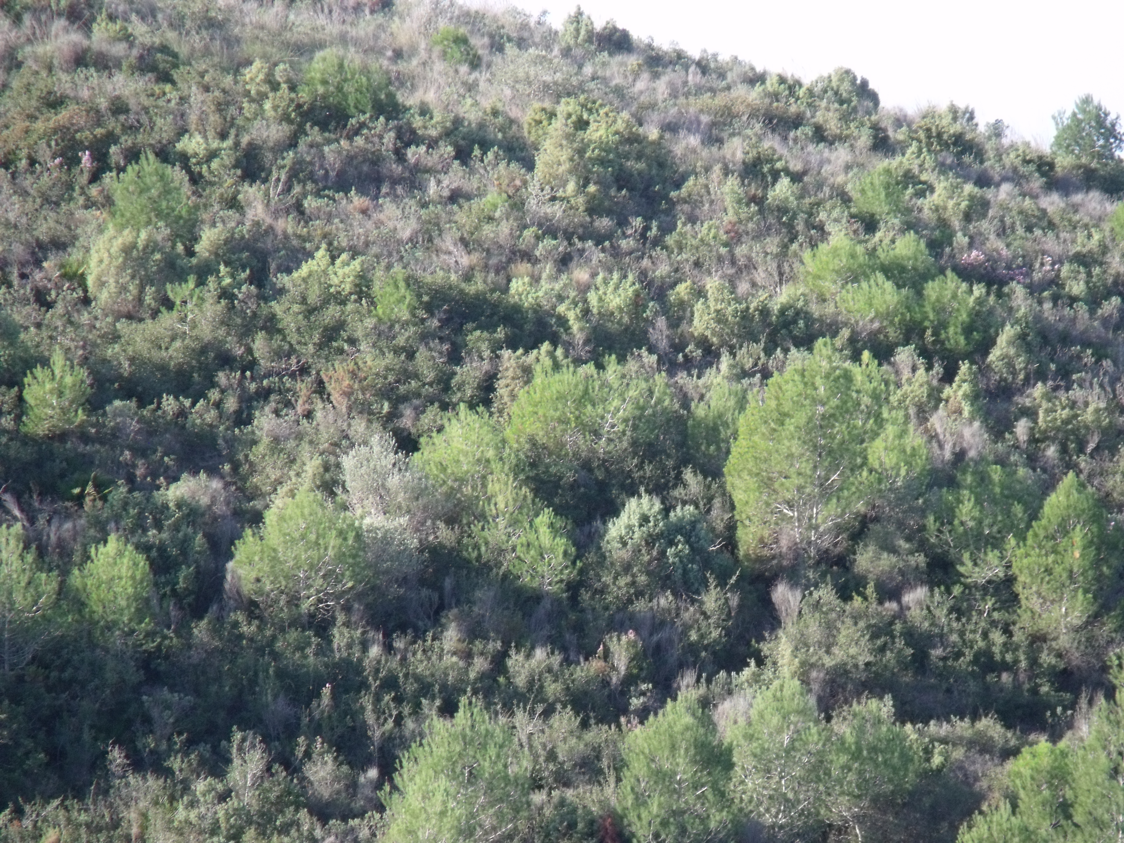 Paisaje del extremo occidental de la Sierra Perenchiza, en el límite de Torrente y Godelleta.